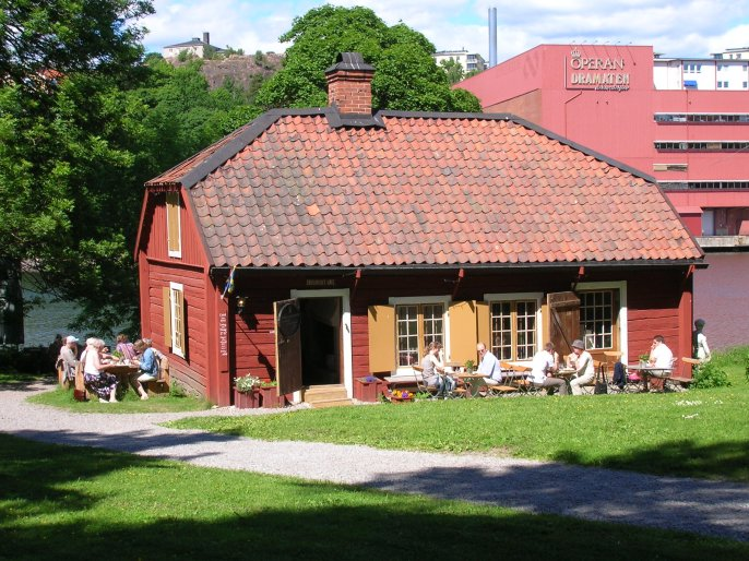 Svindersvik, Café Brygghuset, Nacka, Sweden.